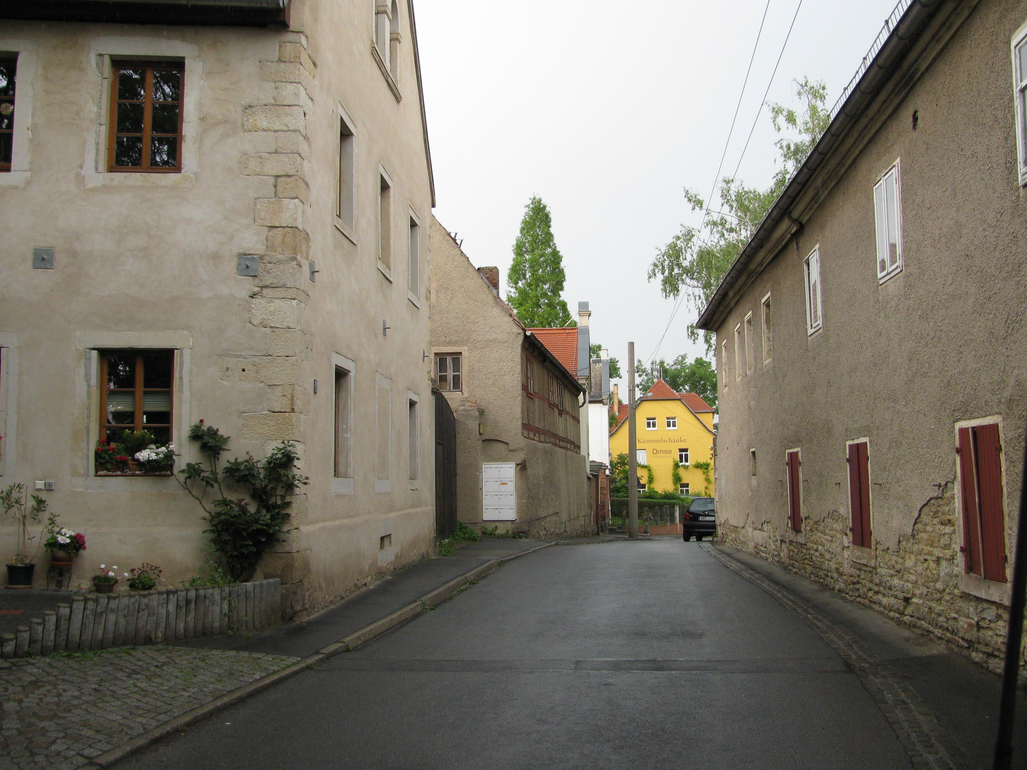 Altomsewitz, Dorfkern von Omsewitz, Stadtteil der Landeshauptstadt Dresden